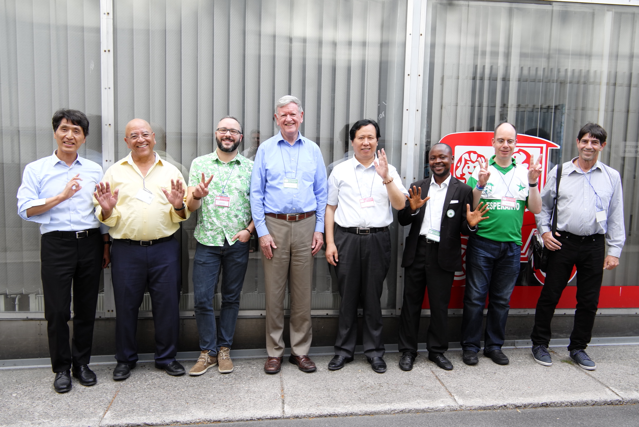 Estraro 2019-2022 de UEA fotita dum la UK 2019 en Lahtio